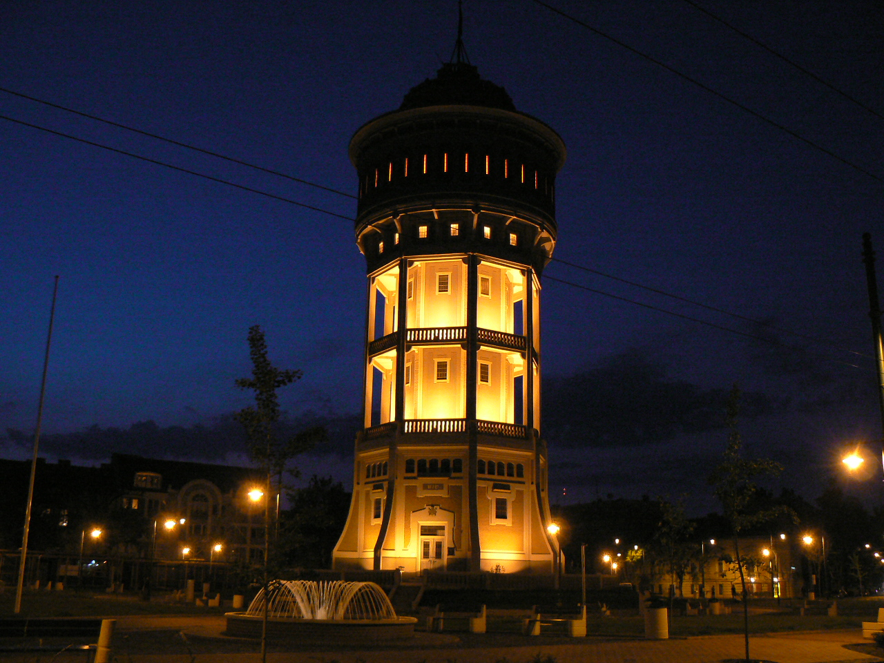 Víztorony éjjel a 2005-06. évi rekonstrukció és tér rehabilitáció után. Szeged, Szent István tér